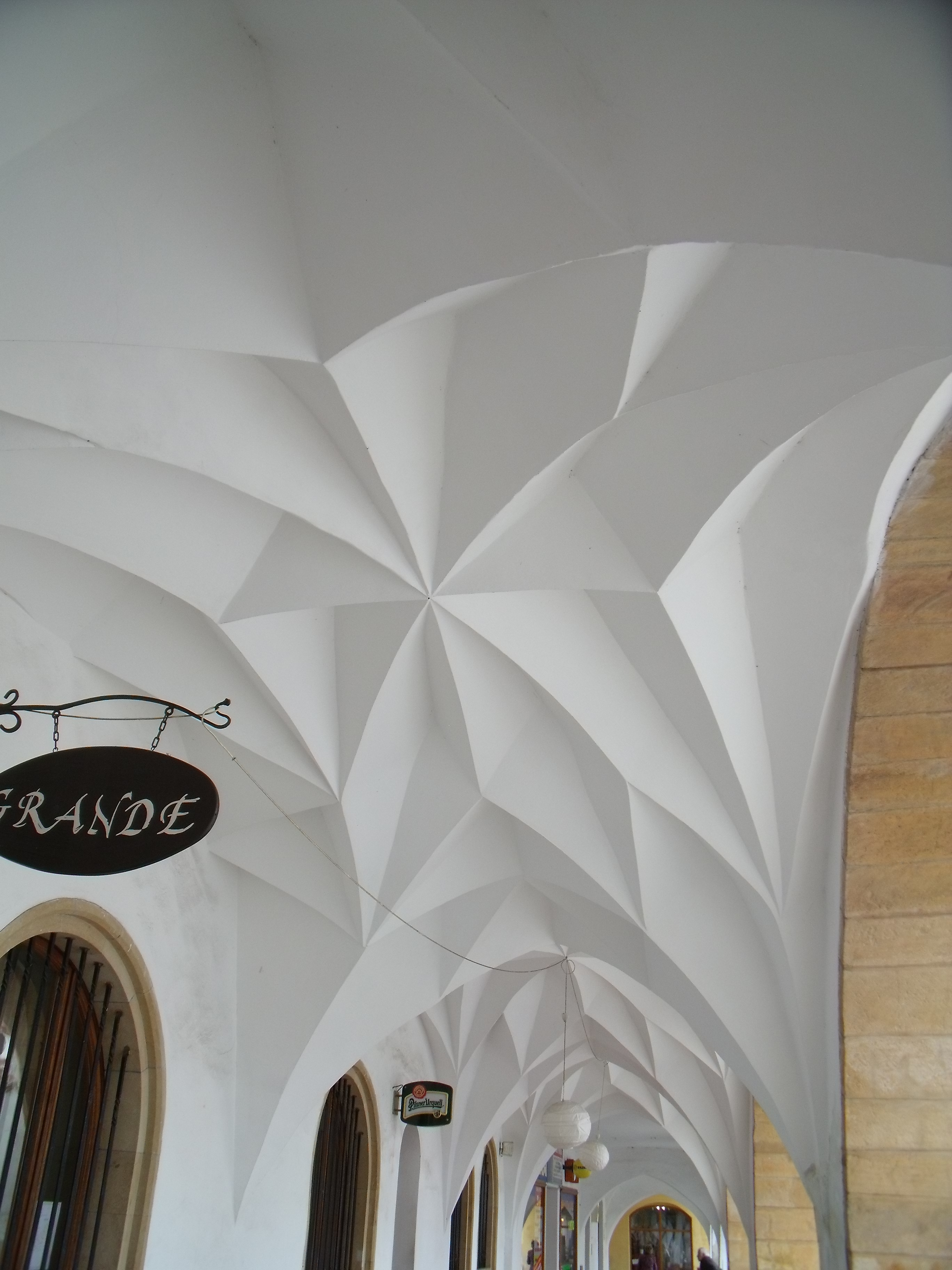 Sklípková klenba v domě č.p. 9, Náměstí 1. Máje